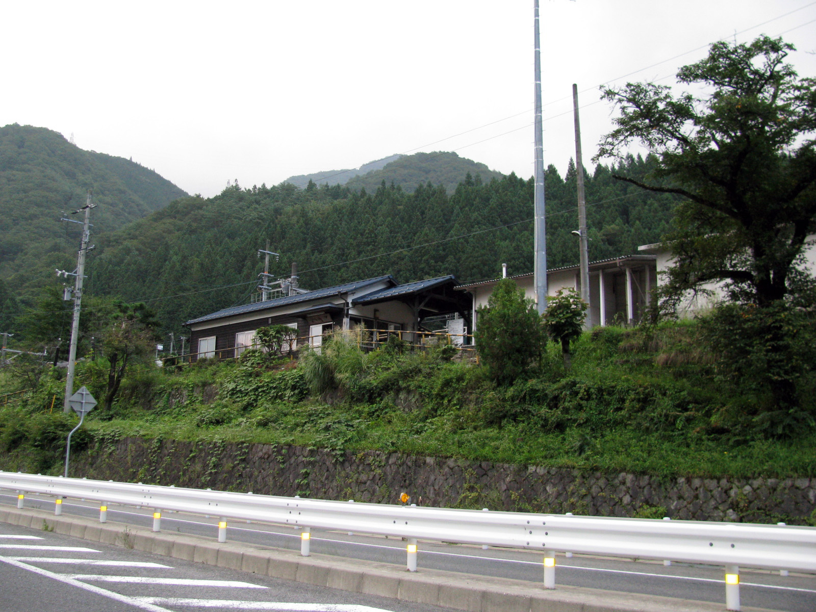 JR中央本線倉本駅